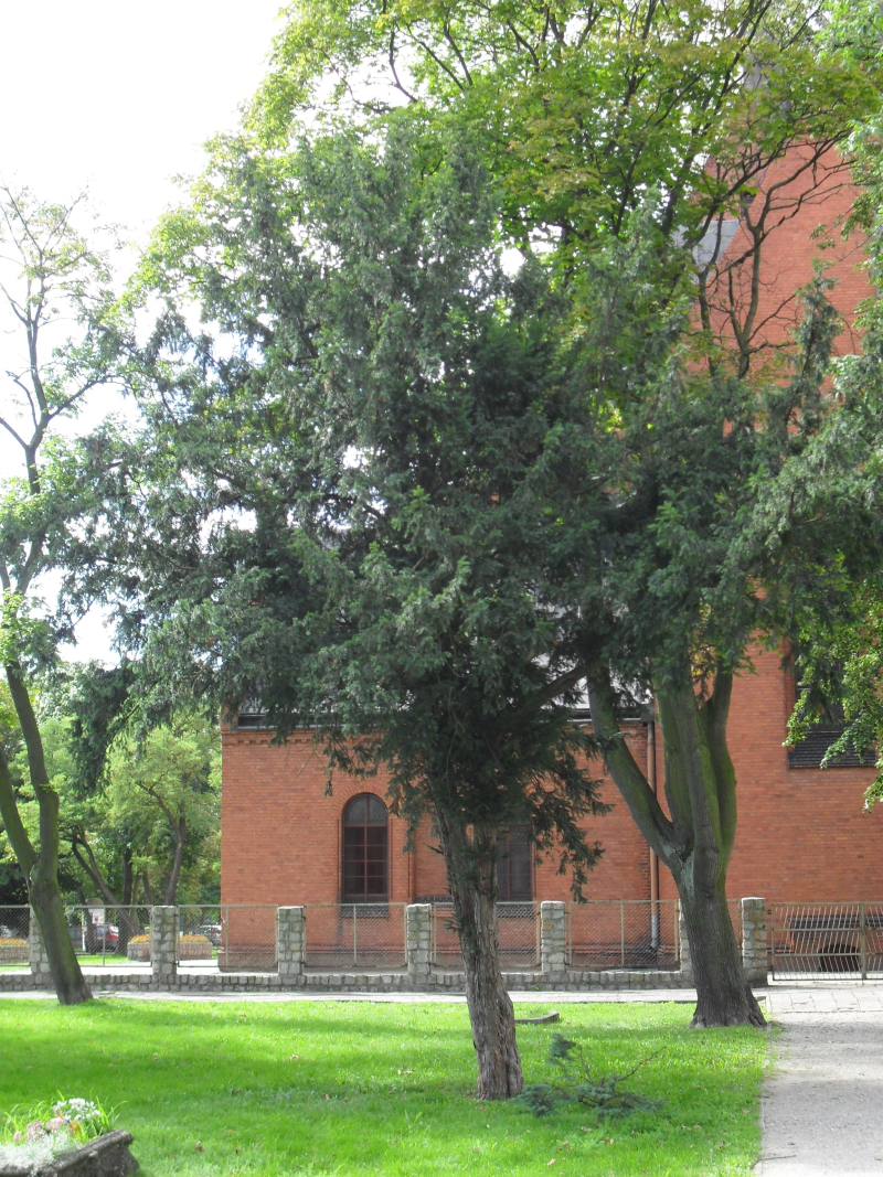 Pomnik przyrody cis pospolity na cmentarzu przy ul. A Mickiewicza - obwód 106 cm.